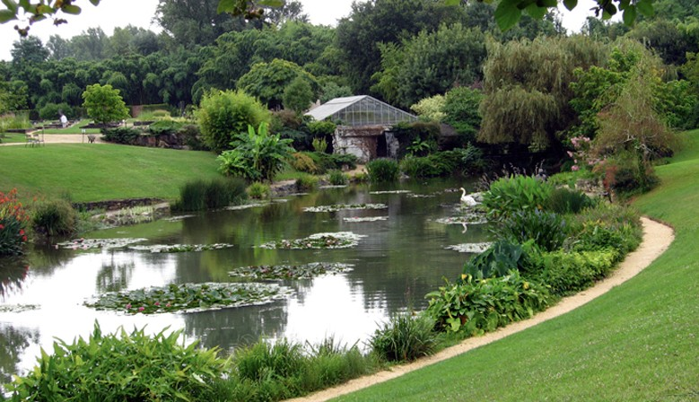 Vue du jardin depuis l'étendue d'eau